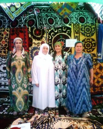 Женщины Таджикистана в национальной одеждеТоҷикӣ: Занҳои Тоҷикистон бо либоси миллӣ